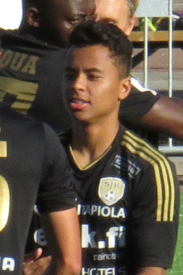 Allan Rodrigues de Souza, brasilialainen jalkapalloilija Seinäjoen Jalkapallokerhon joukkueessa kaudella 2015.